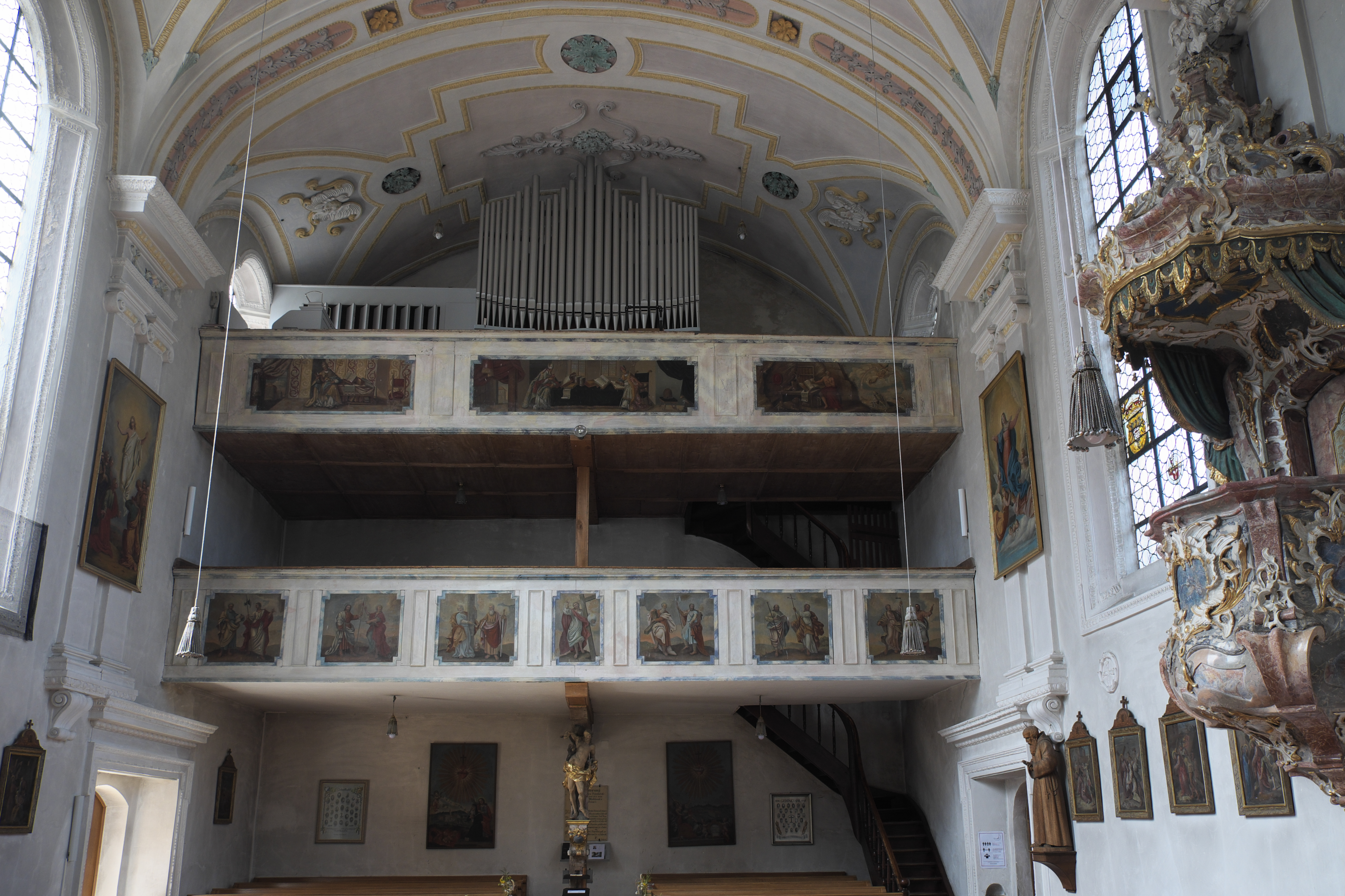 Katholische Pfarrkirche St. Wolfgang in Mickhausen im schwäbischen Landkreis Augsburg (Bayern/Deutschland), Doppelempore mit Tafelbildern aus dem späten 17. Jahrhundert